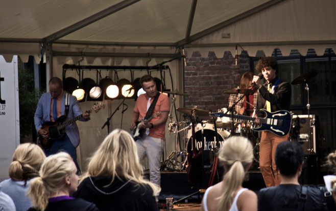 Donkeyboy at Grillfest, Oslo.